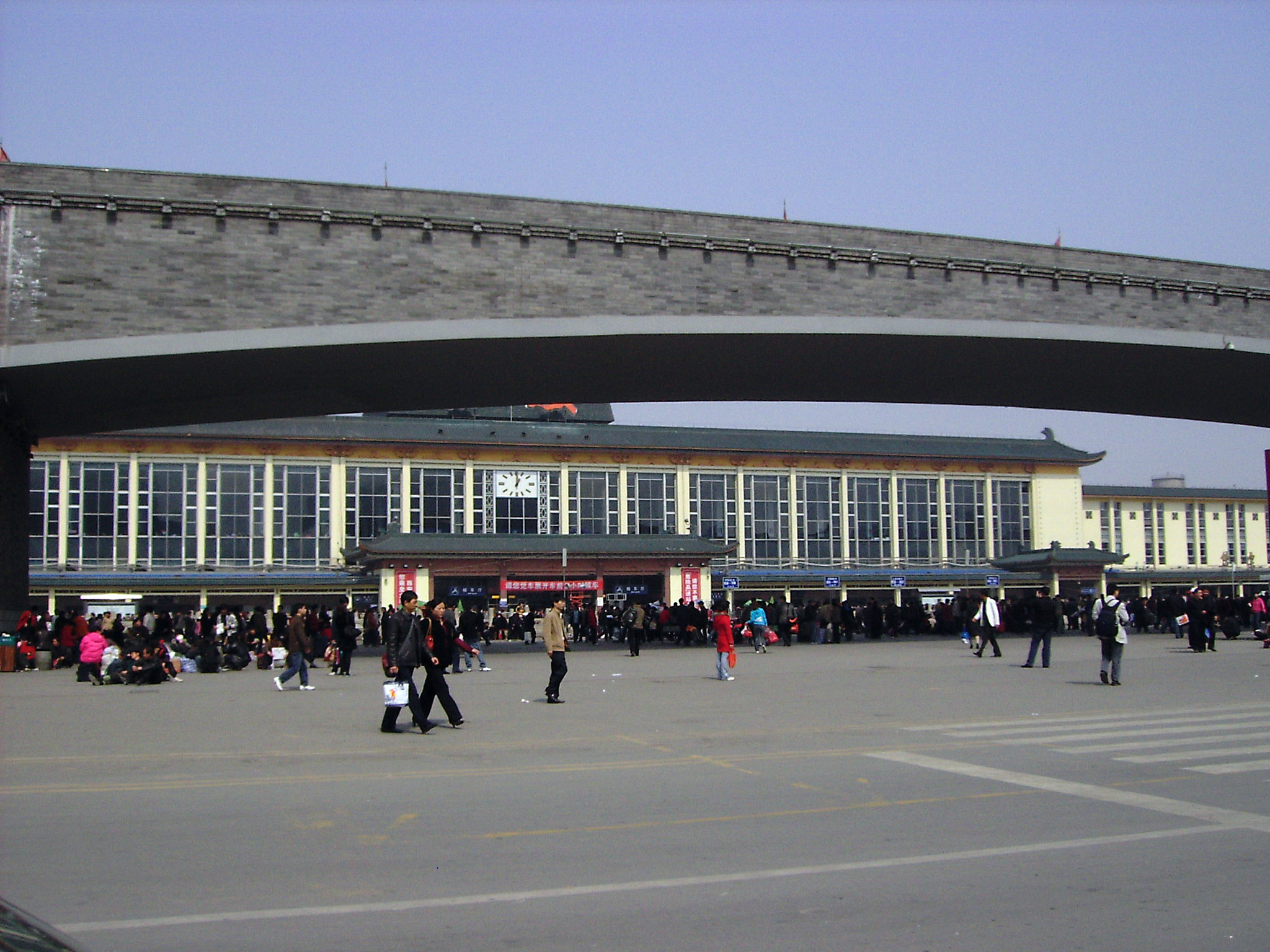 城墙后的火车站